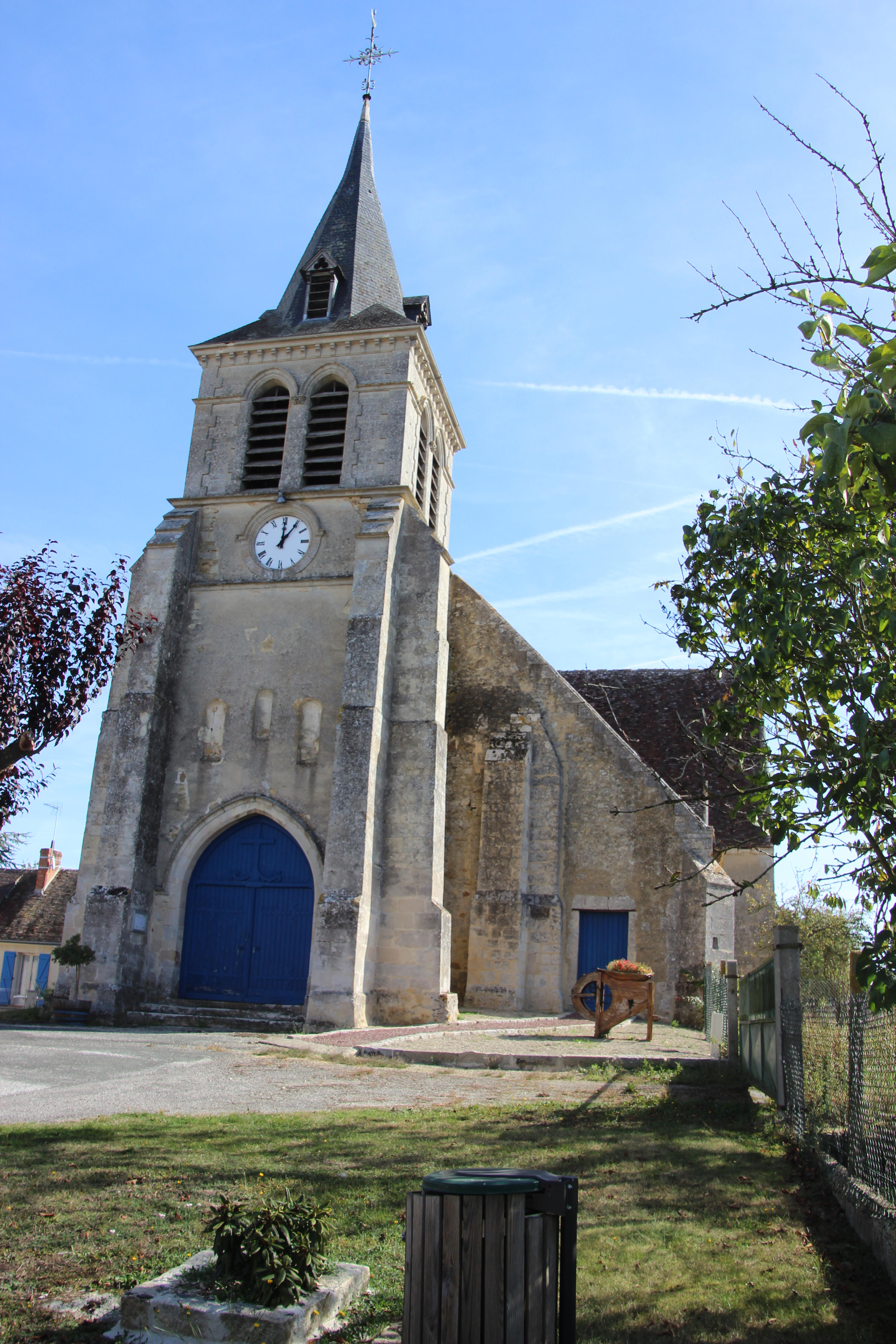 église Saint-Pierre Saint-Paul de Moncé-en-Saosnois - wiki takes le Saosnois